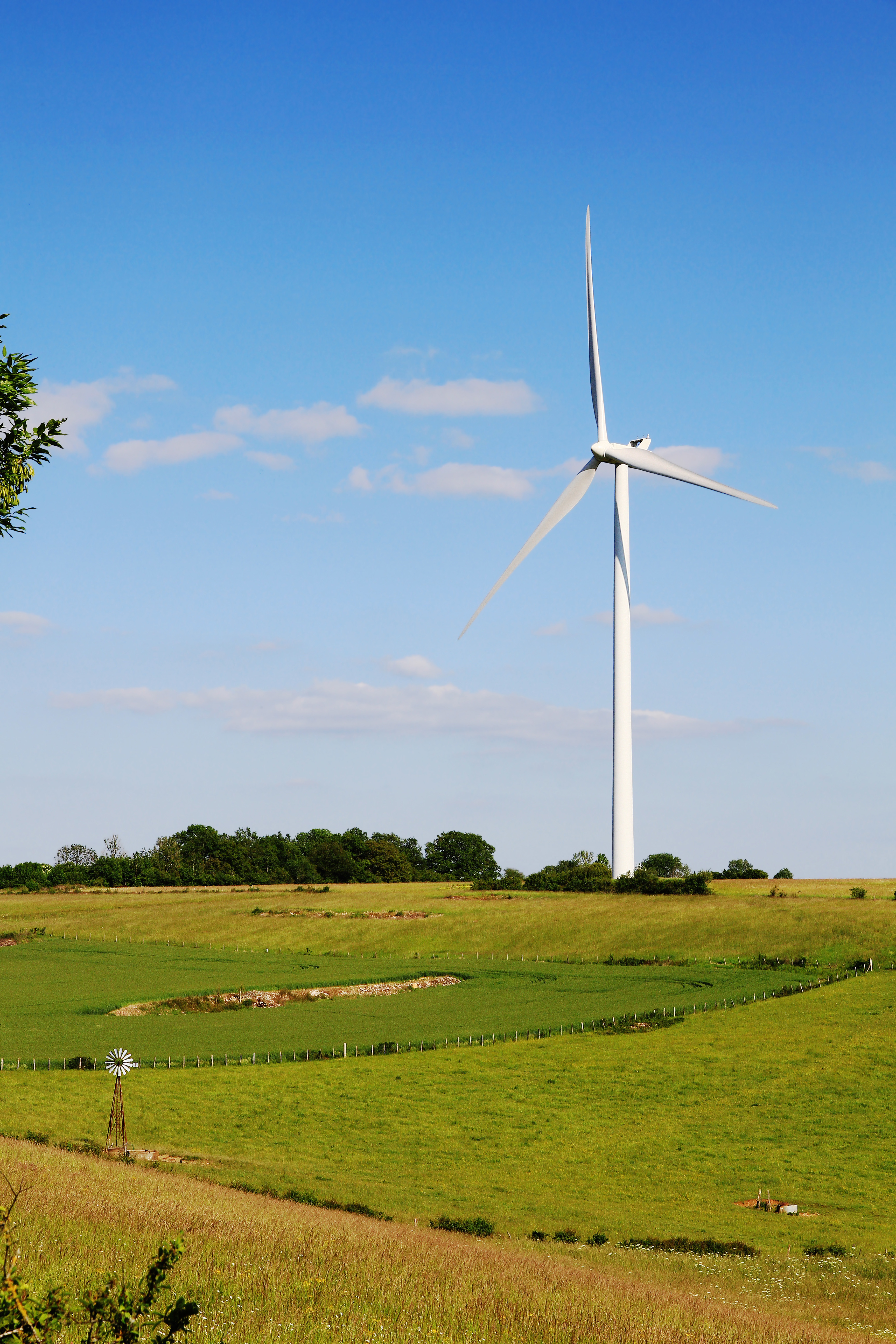 Vieille éolienne d'abreuvoir et nouvelle éolienne aérogénératrice